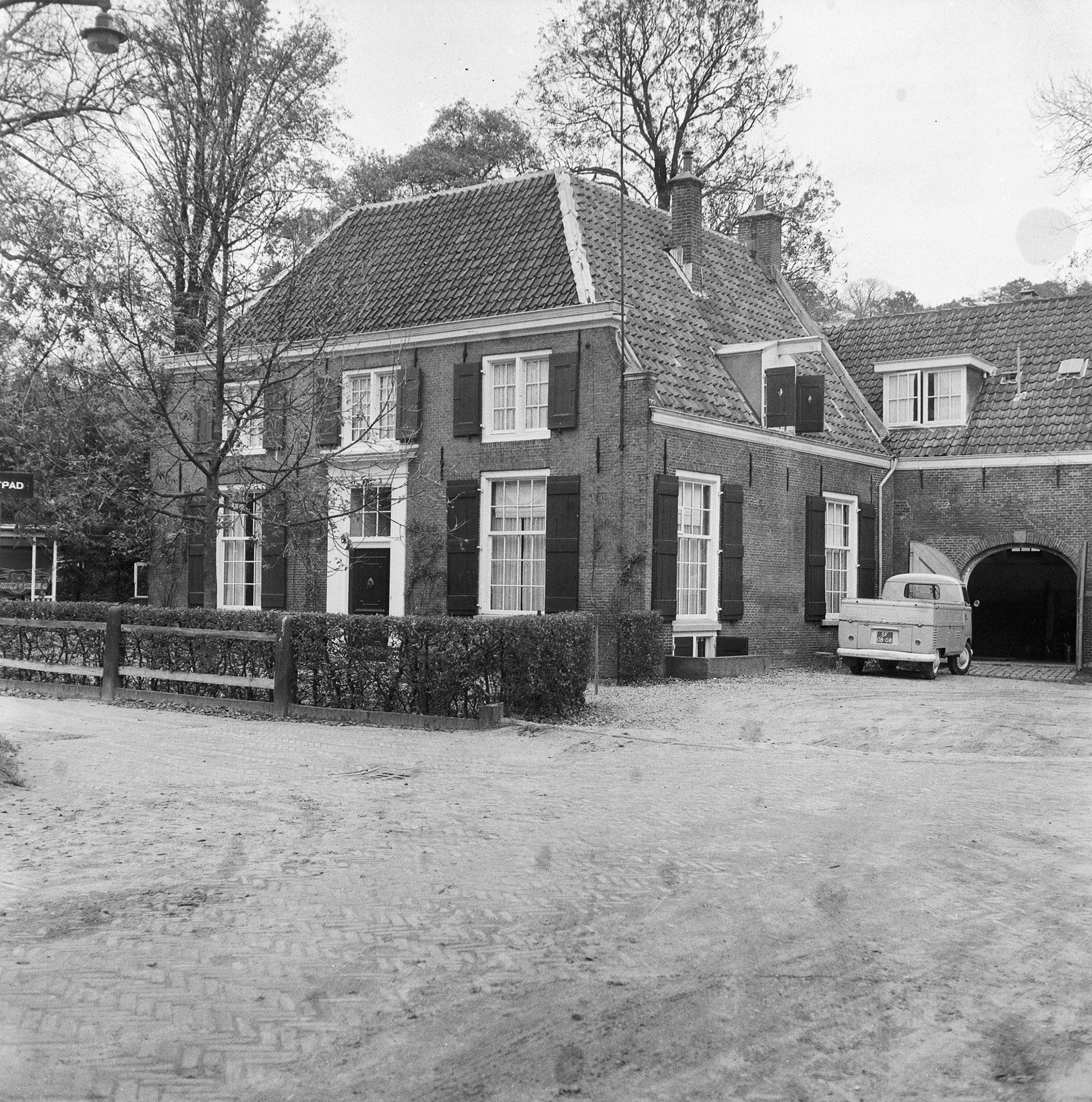 Gulden Bodem: voor- en zijgevel